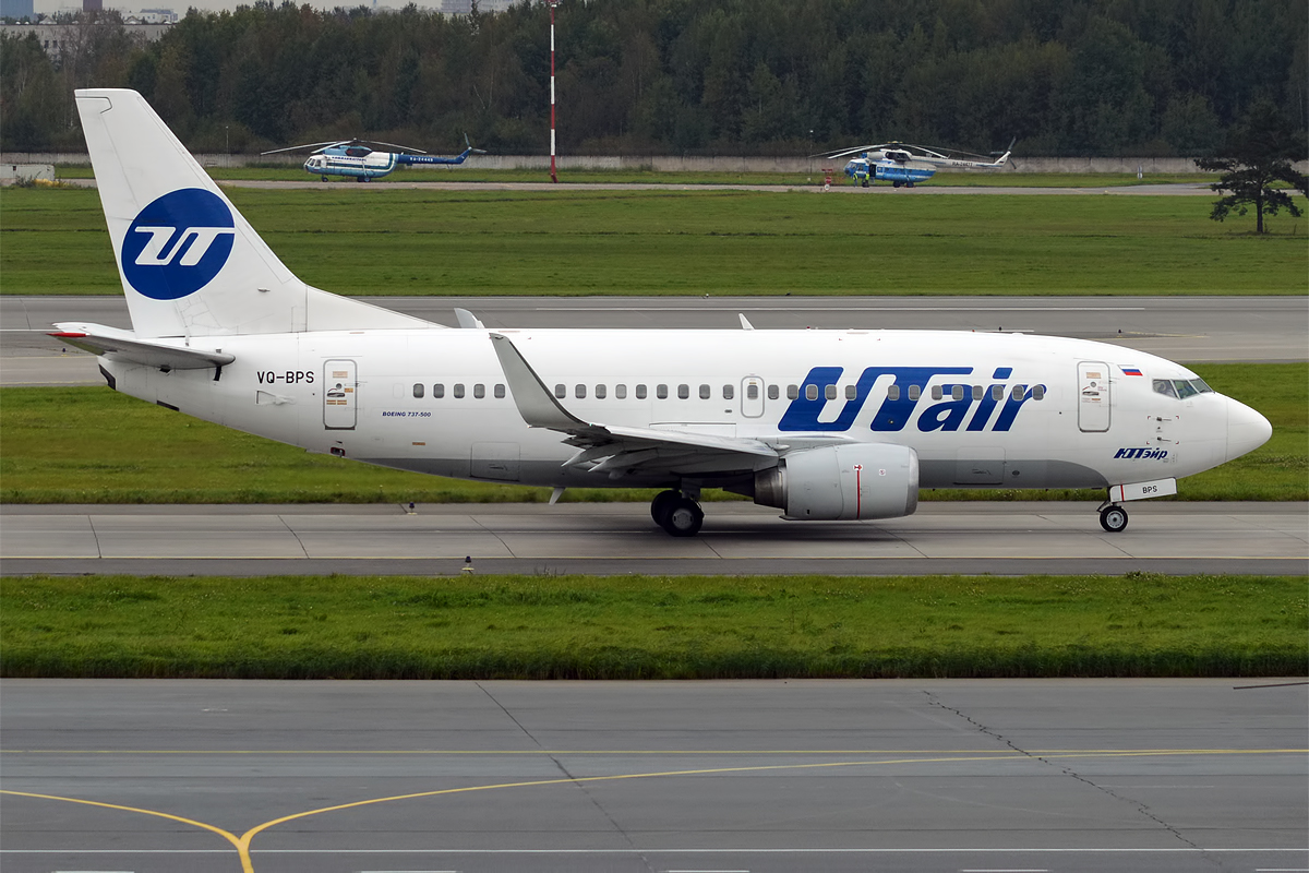 UTair, VQ-BPS, Boeing 737-524